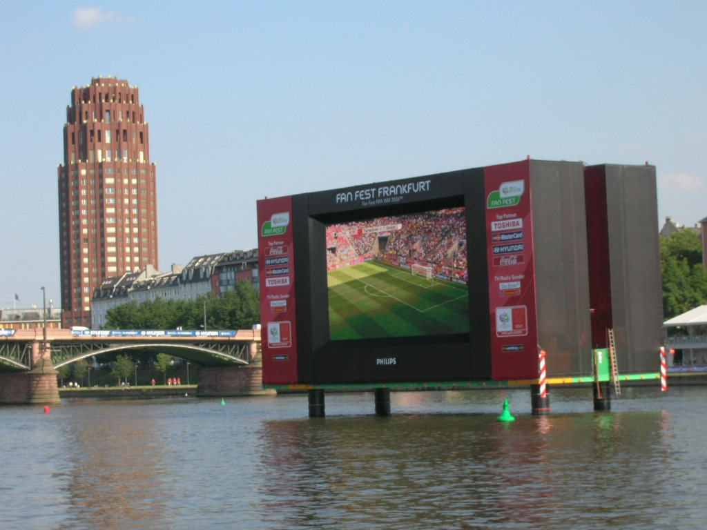 La Majna Areno estas ekranego meze de la rivero Majno en Frankfurto kaj spektejo kun miloj da sidlokoj je la riverbordo, okaze de la Futbala Mondpokalo 2006 en Germanio - unu el la multaj ofertoj por futbalemuloj, kiuj alvojagxis sen enirbileto stadionaj kaj ne plu ricevis tiajn biletojn nigramerkate, tamen vidi la matcxojn